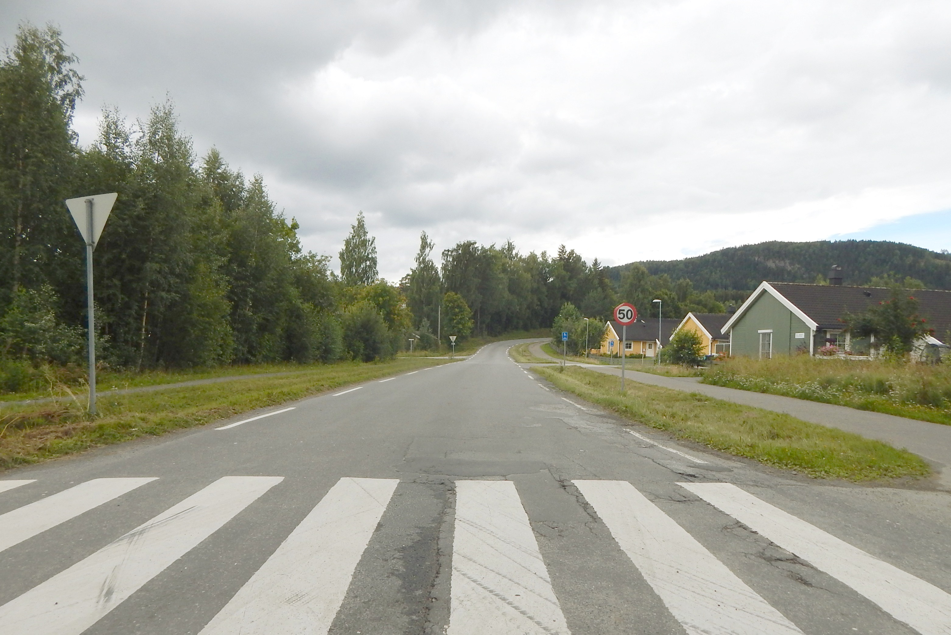 Klomsteinrovegen (fylkesvei 2418, tidl. 166) sett fra Birivegen